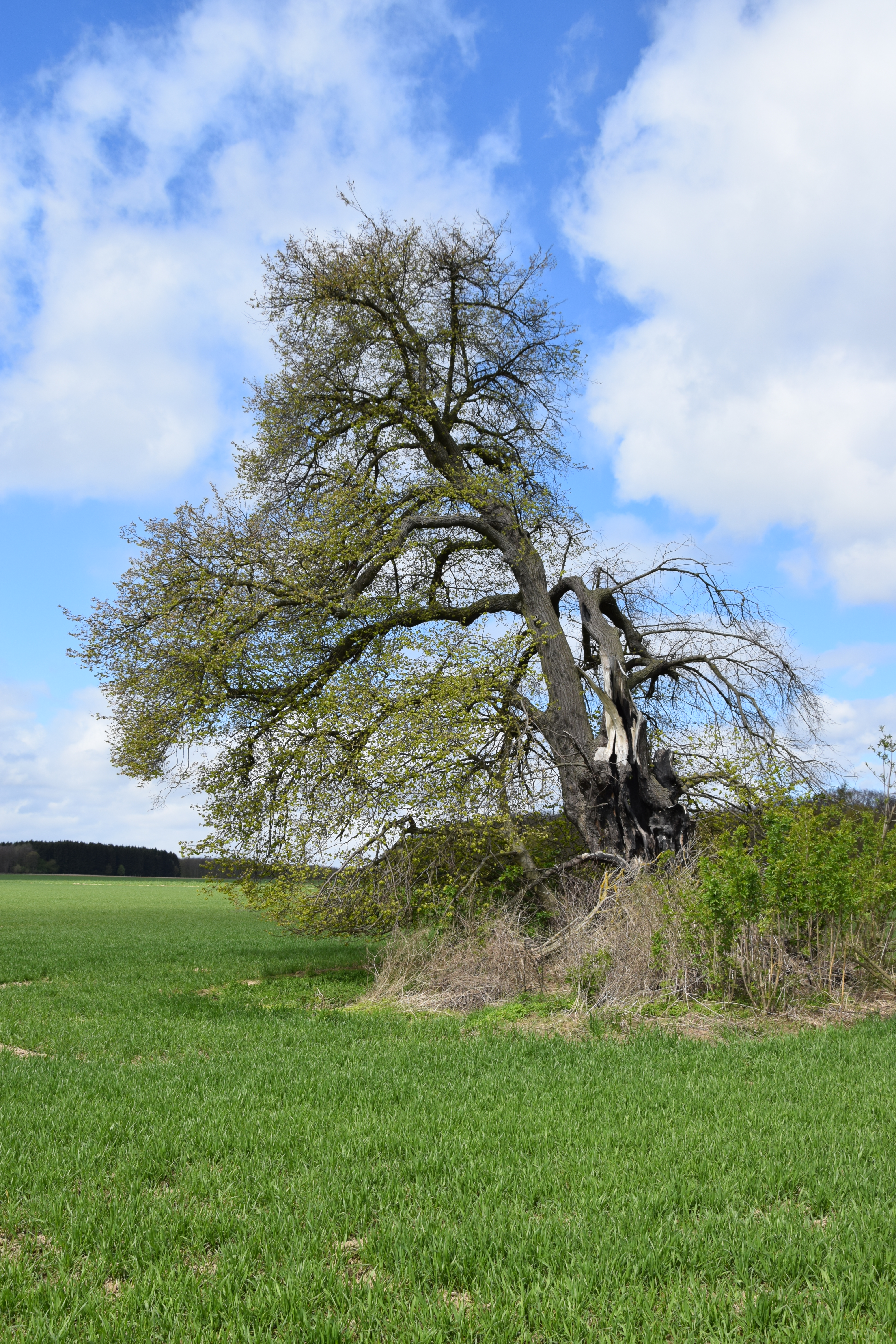 Heidenteichlinde bei Holdenstedt, Naturdenkmal ND0029SGH